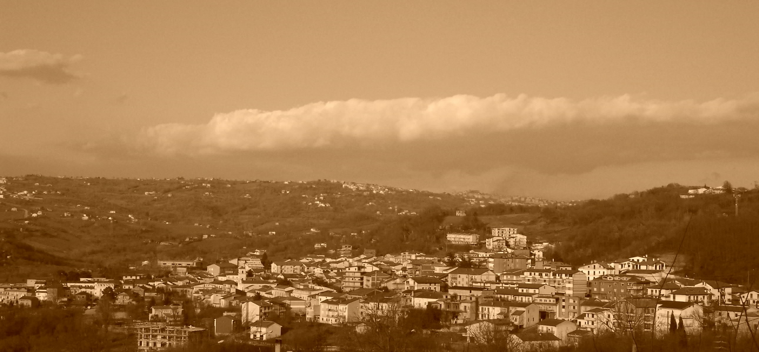 Panorama di Pratola Serra dallo stadio comunale